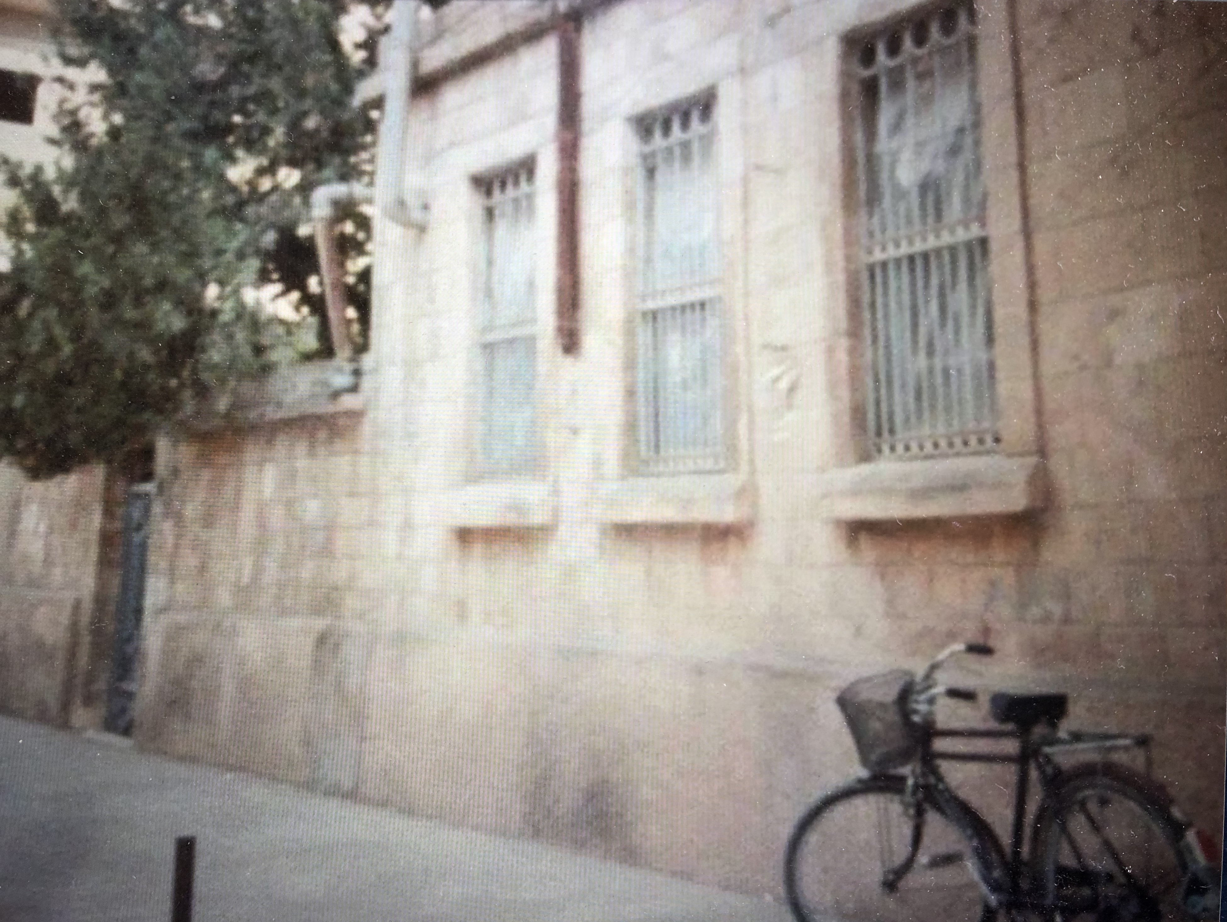 Première mais construite à Kaméchli